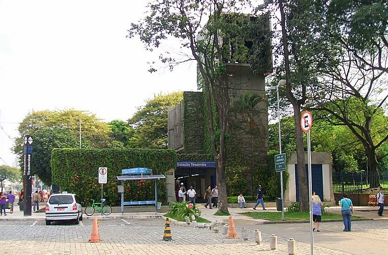 Estação Tiradentes do Metrô de São Paulo, Brasil.